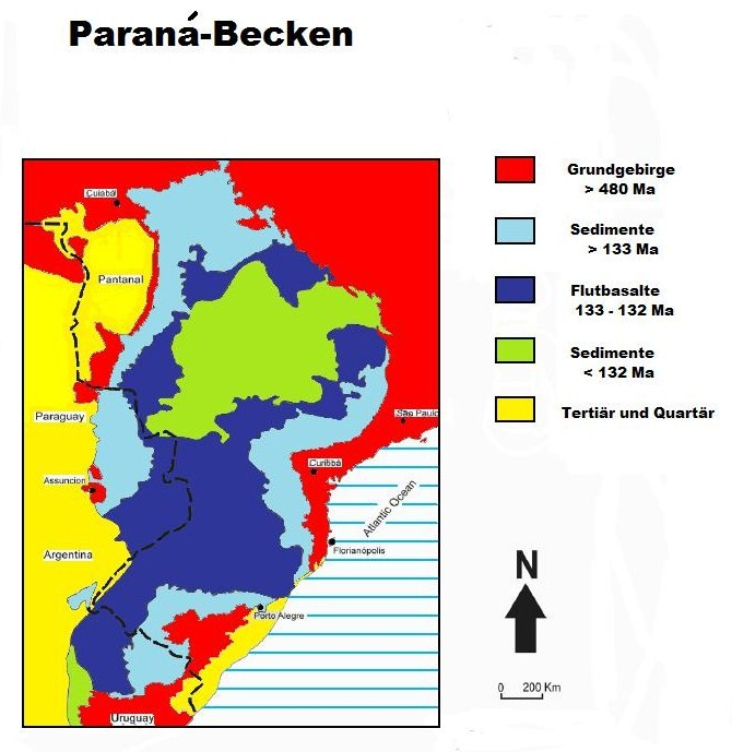 Vereinfachte geologische Karte des Parana-Beckens, nach Milani et al., 1997